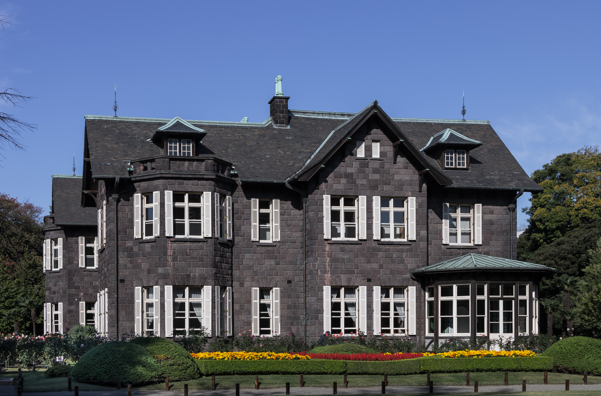 旧古河邸(東京都北区) ジョサイア・コンドル設計（1917年）。